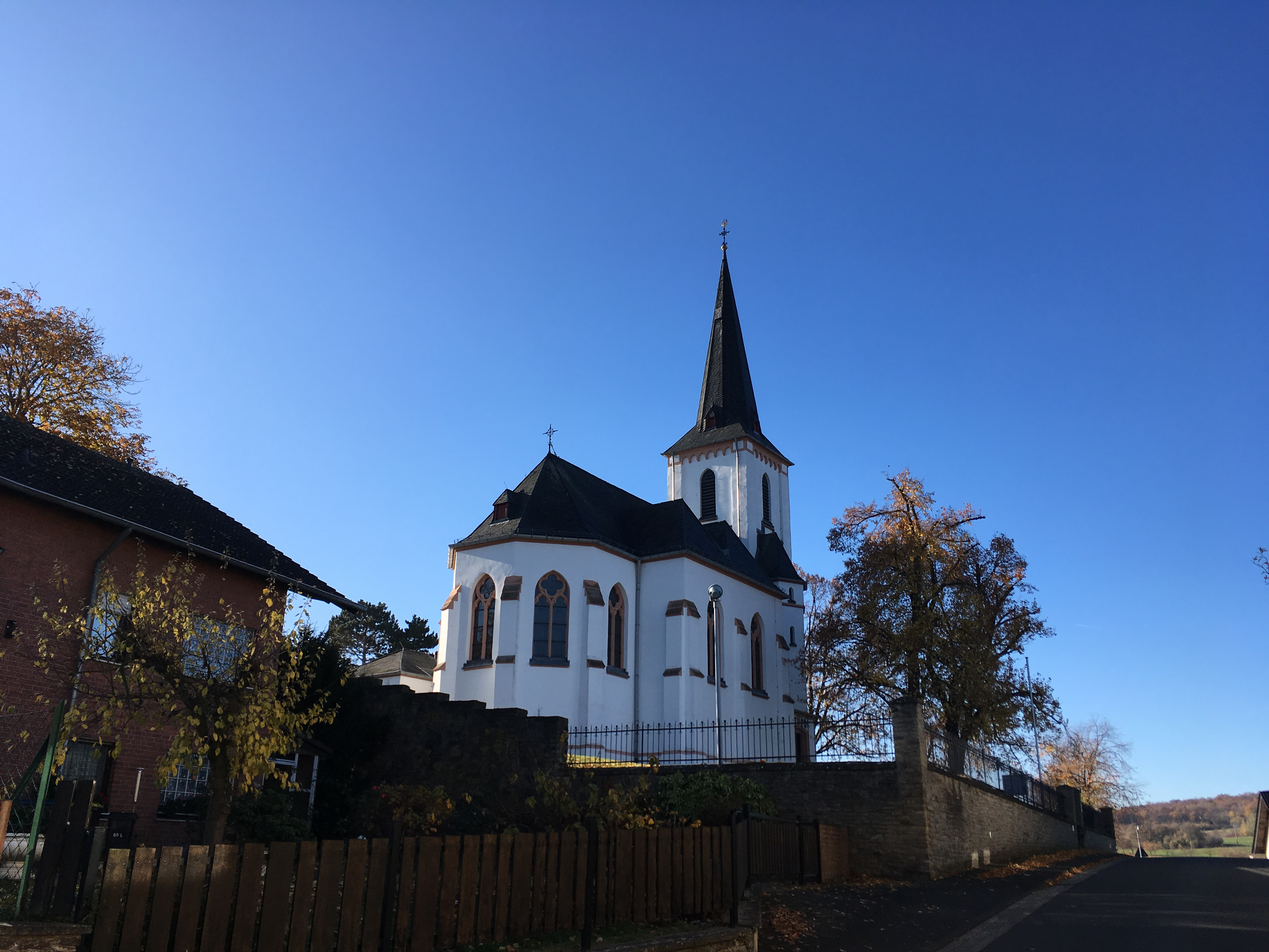 Die Pfarrkirche St. Margareta ist eine Hallenkirche in Eschweiler, Bad Münstereifel. Sie wurde in den Jahren 1901 und 1902 auf einem Vorgängerbau errichtet. Die Fenster stammen von den Glasmalern Hermann Gottfried sowie Heinrich Oidtmann II.